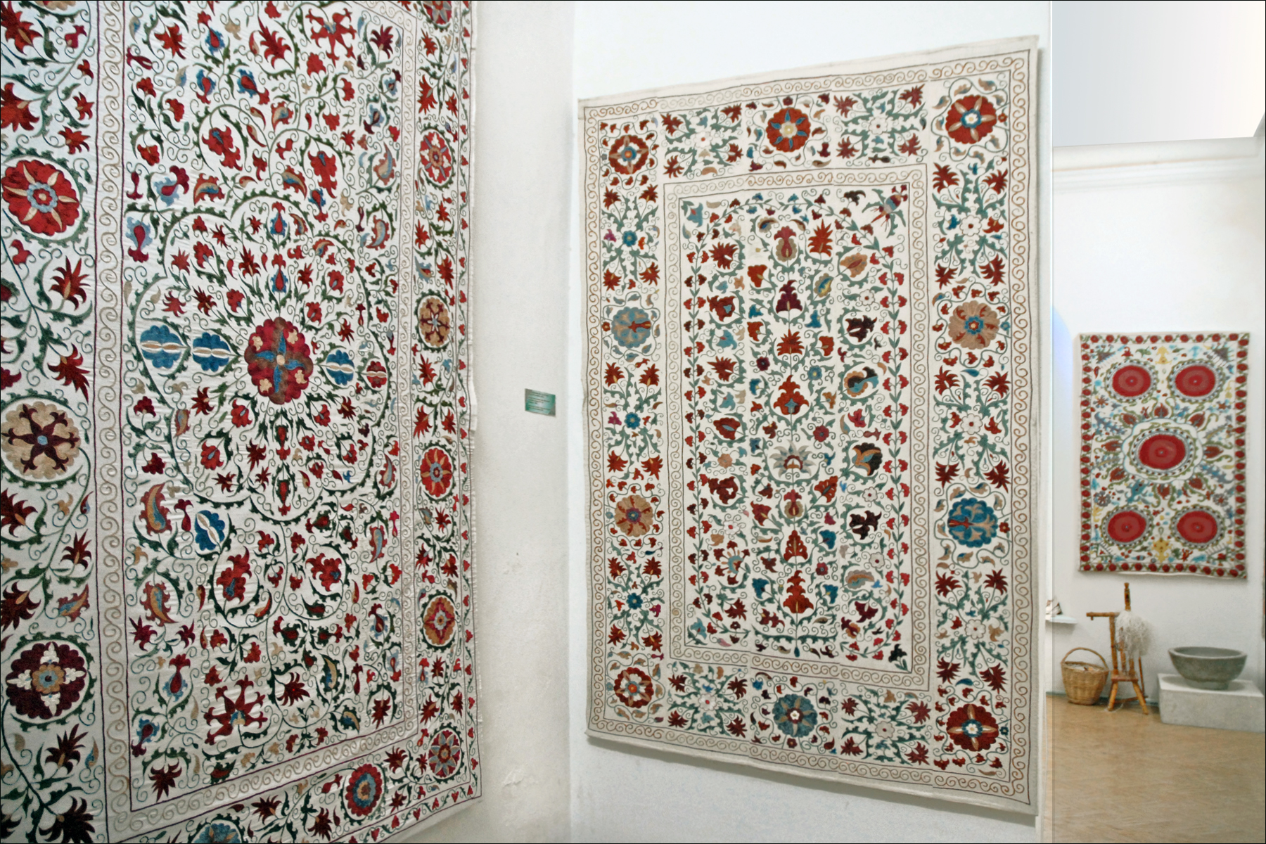 Une des salles du musée de la broderie (dans les bâtiments du harem) Sitori-i-Mokhi Khosa (Sitoraï Mokhi-Khossa) : "le palais de la lune et des étoiles" était la résidence d'été des derniers Emirs de Boukhra. Il est situé à 4 km au nord de Boukhara. Il s'agit d'une construction récente, commencée à la fin du 19ème siècle par l'Emir Akhad Khan, puis étendue en 1911-1914 par son fils Alim Khan avec le soutien des Russes et sous leur influence. Le dernier Emir a été renversé par les Soviétiques en 1920, il est mort en exil. Le style du palais d'été est composite, associant l'architecture russe à des éléments décoratifs de l'Asie centrale. L'architecte principal était Ousto Khodja Khafiz. Le palais comprend trois corps de bâtiments qui ont été transformés en musées : les appartements et salles de réception (musée des arts appliqués), le palais octogonal pour les invités (musée des costumes) et le harem (musée d'ethnographie et de la broderie).